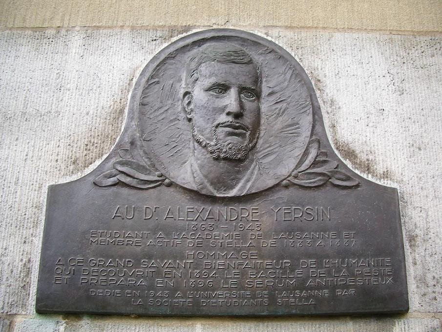 Plaque honorique dédiée à Yersin, Gymnase de la cité, à Lausanne en Suisse